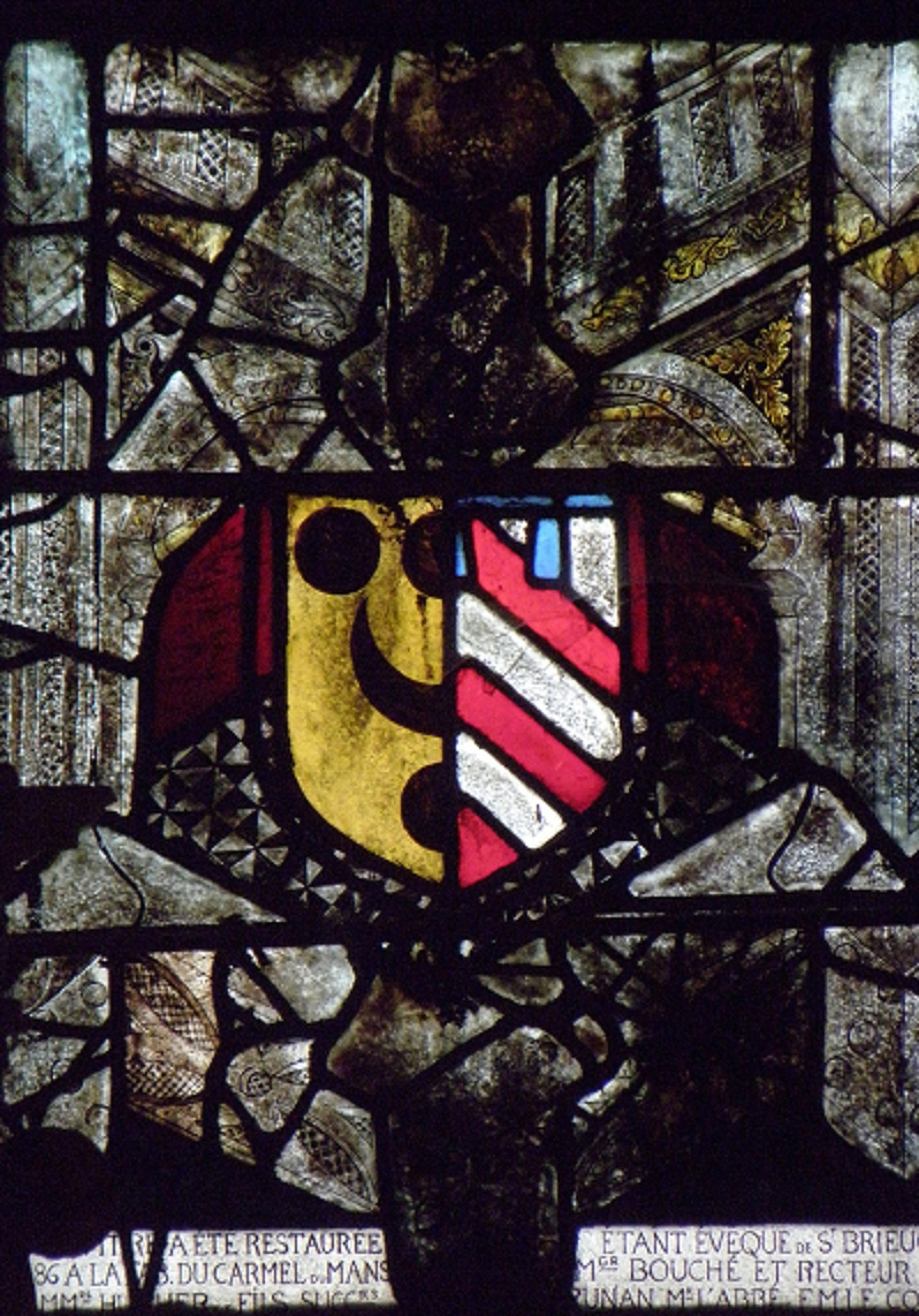 Armes mi-partites des Kergrist et des Plusquellec. Maîtresse-vitre de l'église Notre-Dame de Runan (22).